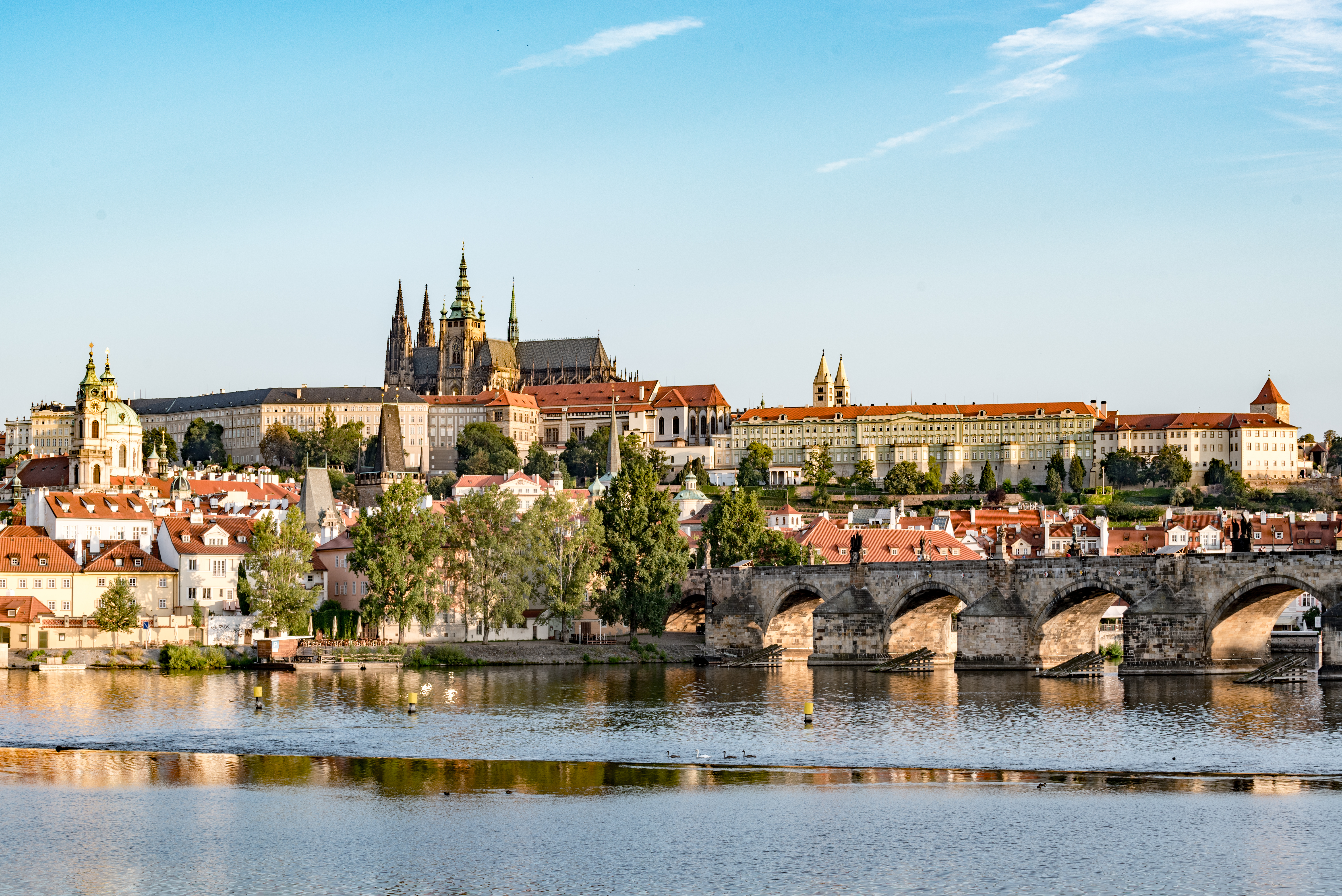 Praha, Staré Město, Karlův most